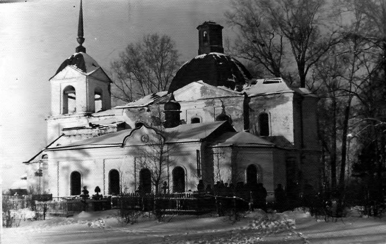 Церковь Иоанна Богослова в 1950-е - 1960-е годы. Церковь ещё имела довольно-таки хороший внешний вид. Затем началось разрушение.